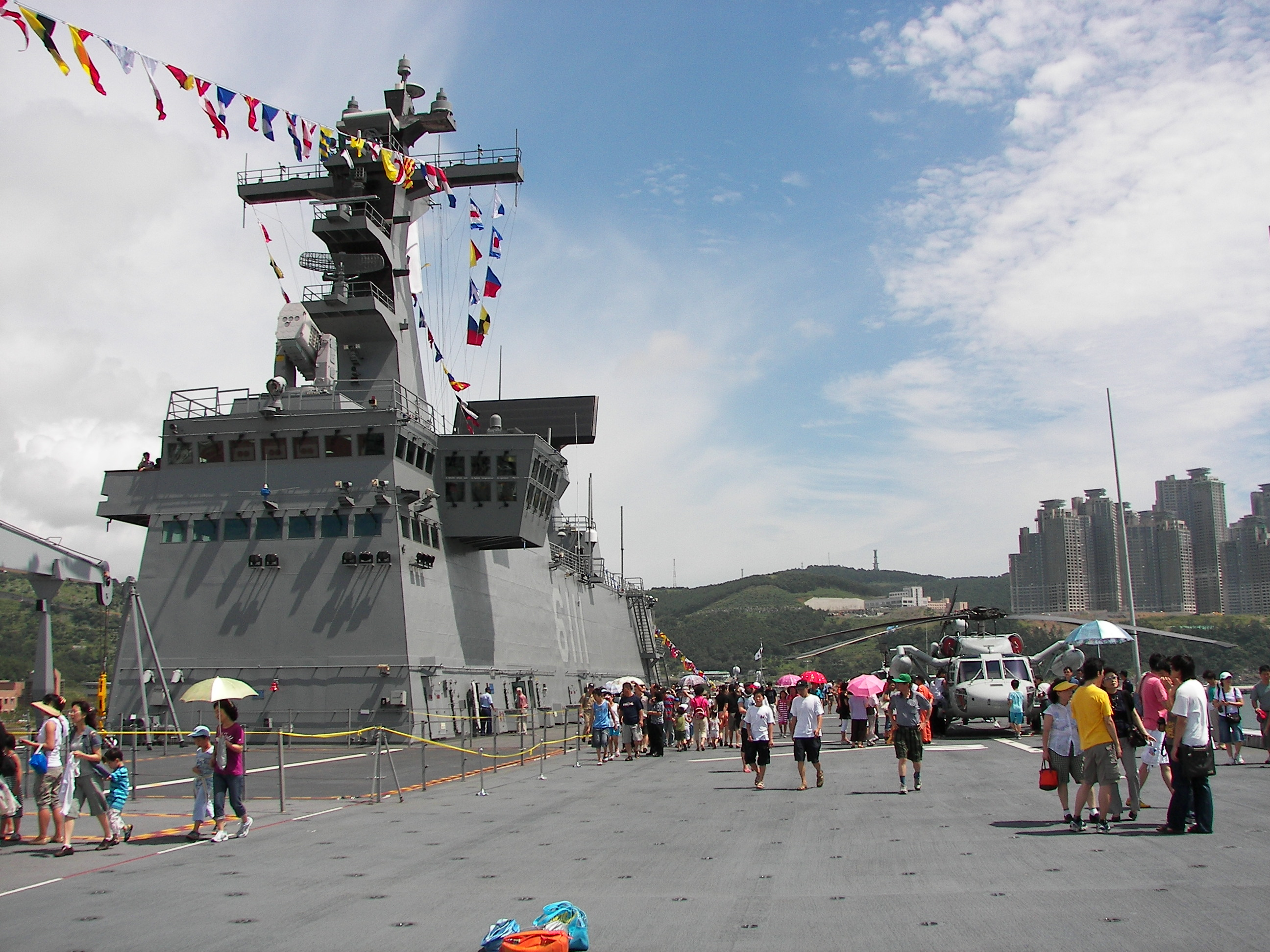 3함대를 방문해 공개행사를 연 독도함의 갑판.